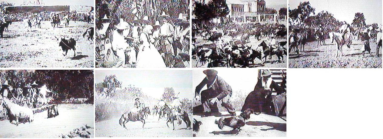 Stills of Lumière´s Cinematographe Views in Atequiza Mexico. Original Titles: Lassage d’un bœuf sauvage, Danse mexicaine, Lassage des bœufs pour le labour, Bignade de chevaux, Cavalier sur un cheval rétif, Lassage d’un cheval sauvage, Combat de coqs